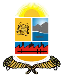 Escudo del municipio Guacara. Estado Carabobo. Venezuela